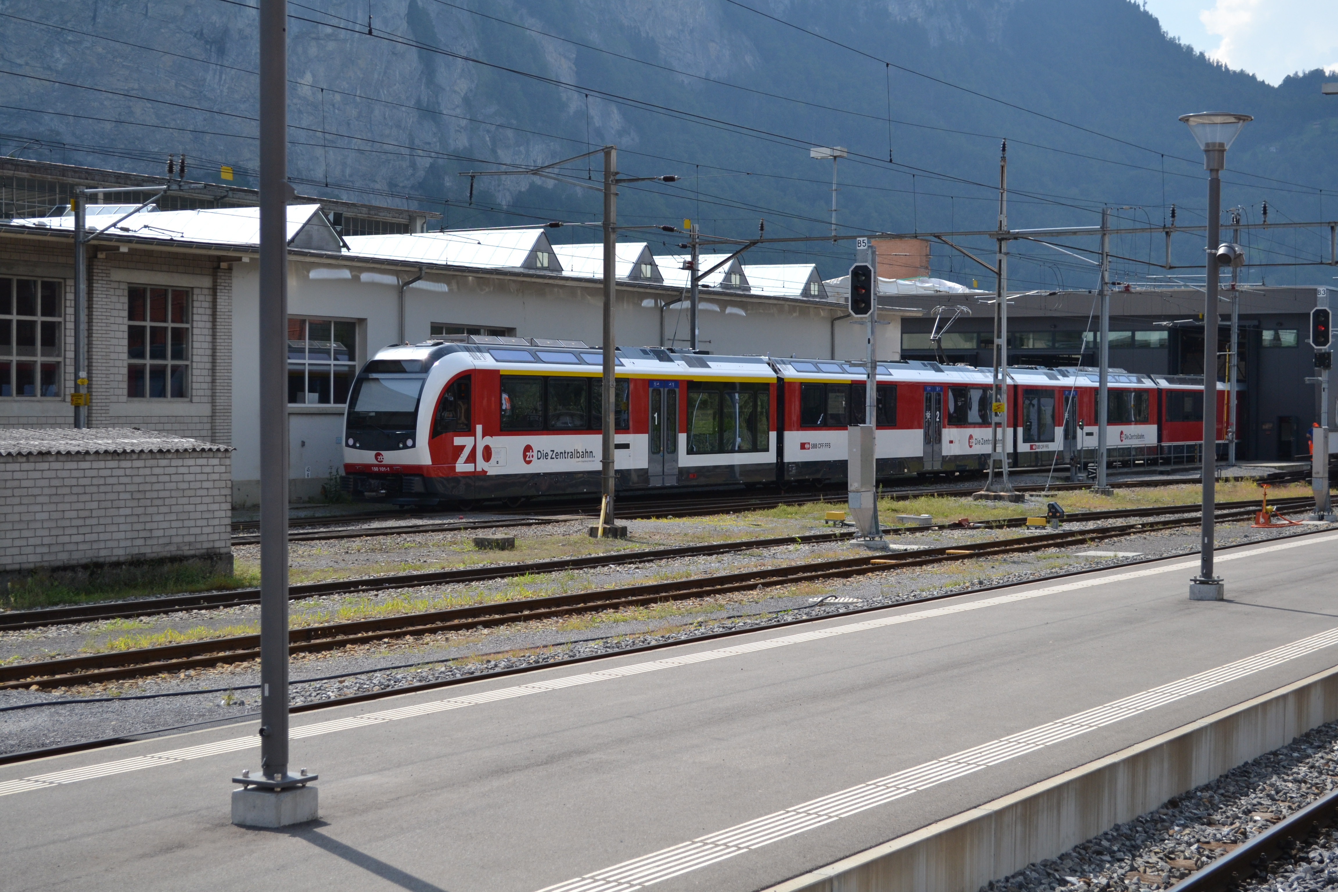 Zentralbahn ABReh 150 treinstel, van het type Stadler ADLER, te Meiringen.